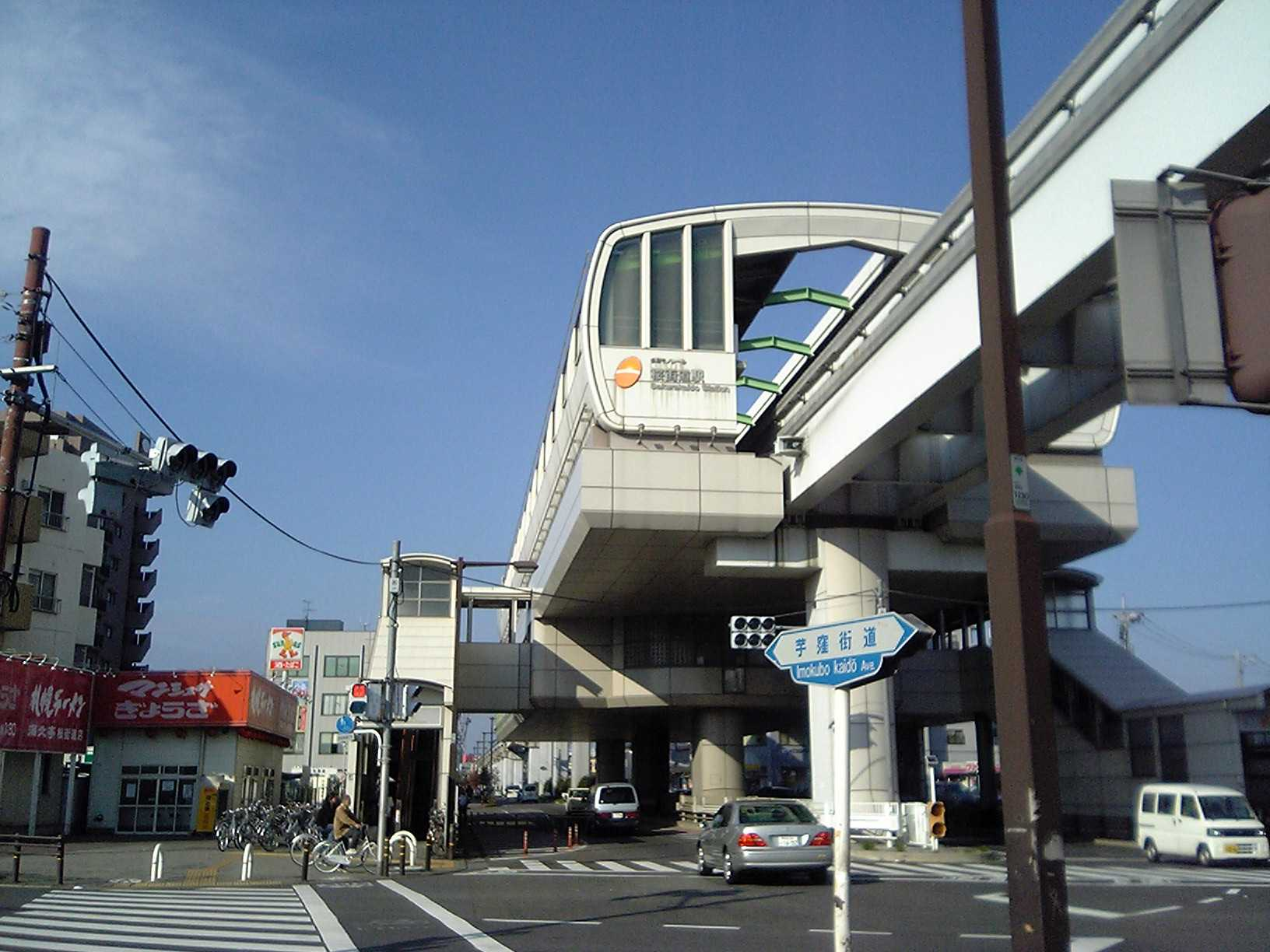 桜街道駅（2007年11月4日撮影）